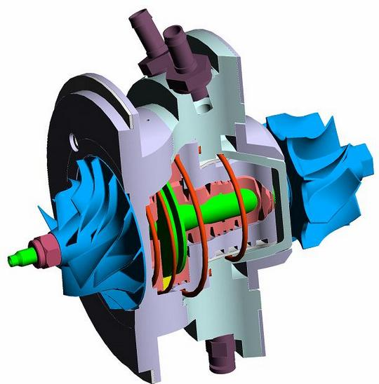 LuftgelagerterTurbolader